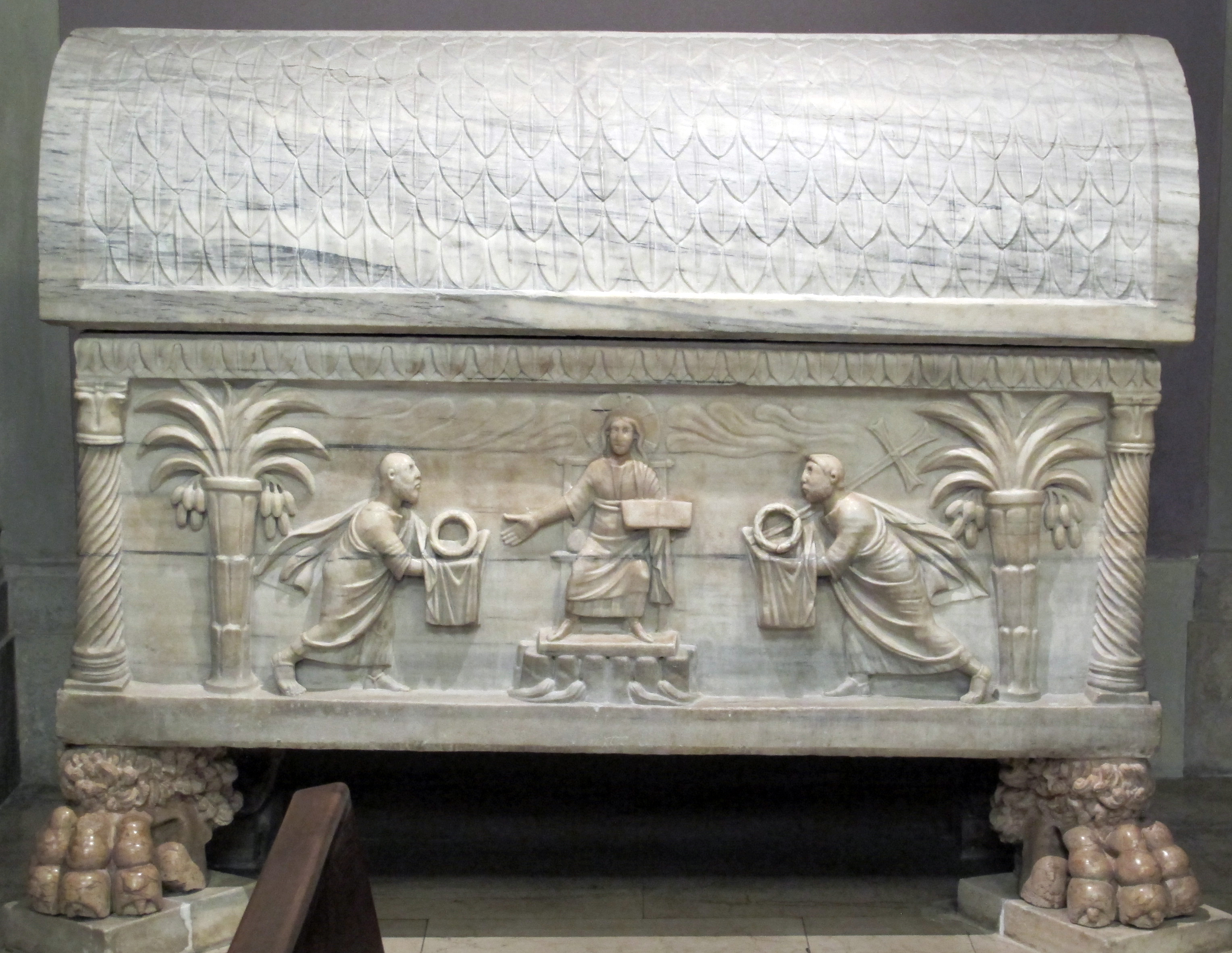 Duomo di ravenna, cappella della madonna del sudore, sarcofago di san rinaldo V sec.